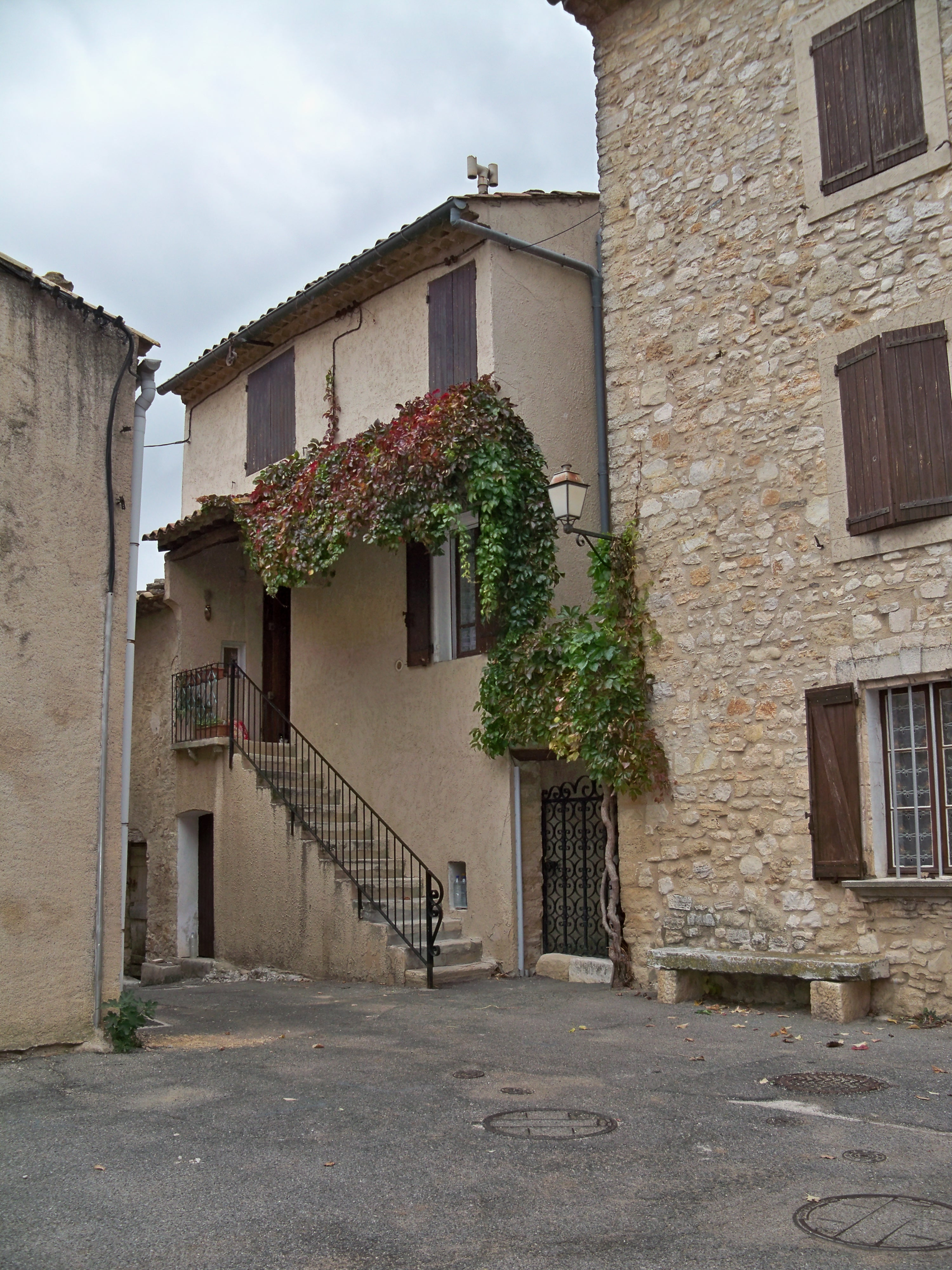 Maison à Caseneuve, Vaucluse, France